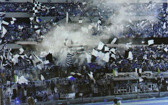 Foto dei tifosi Battipagliesi contro il Potenza 1990